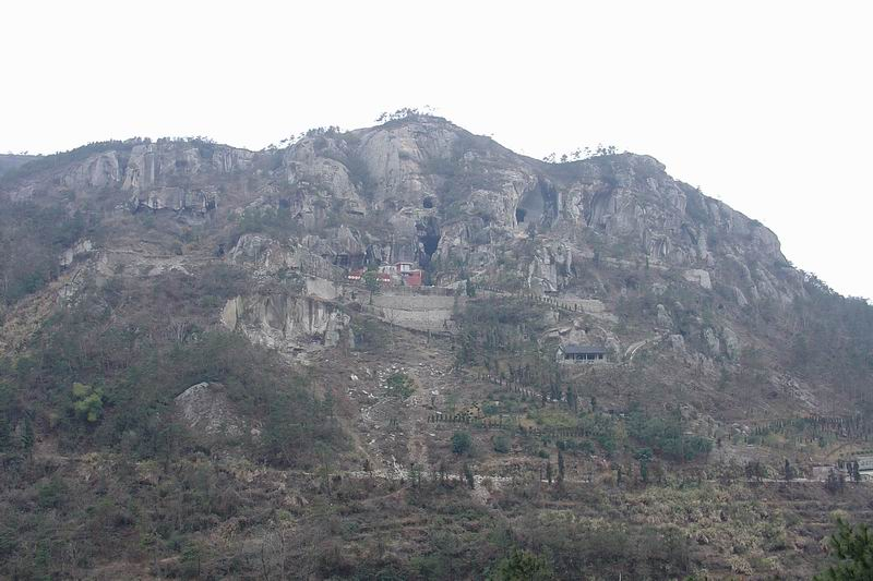 长屿硐天